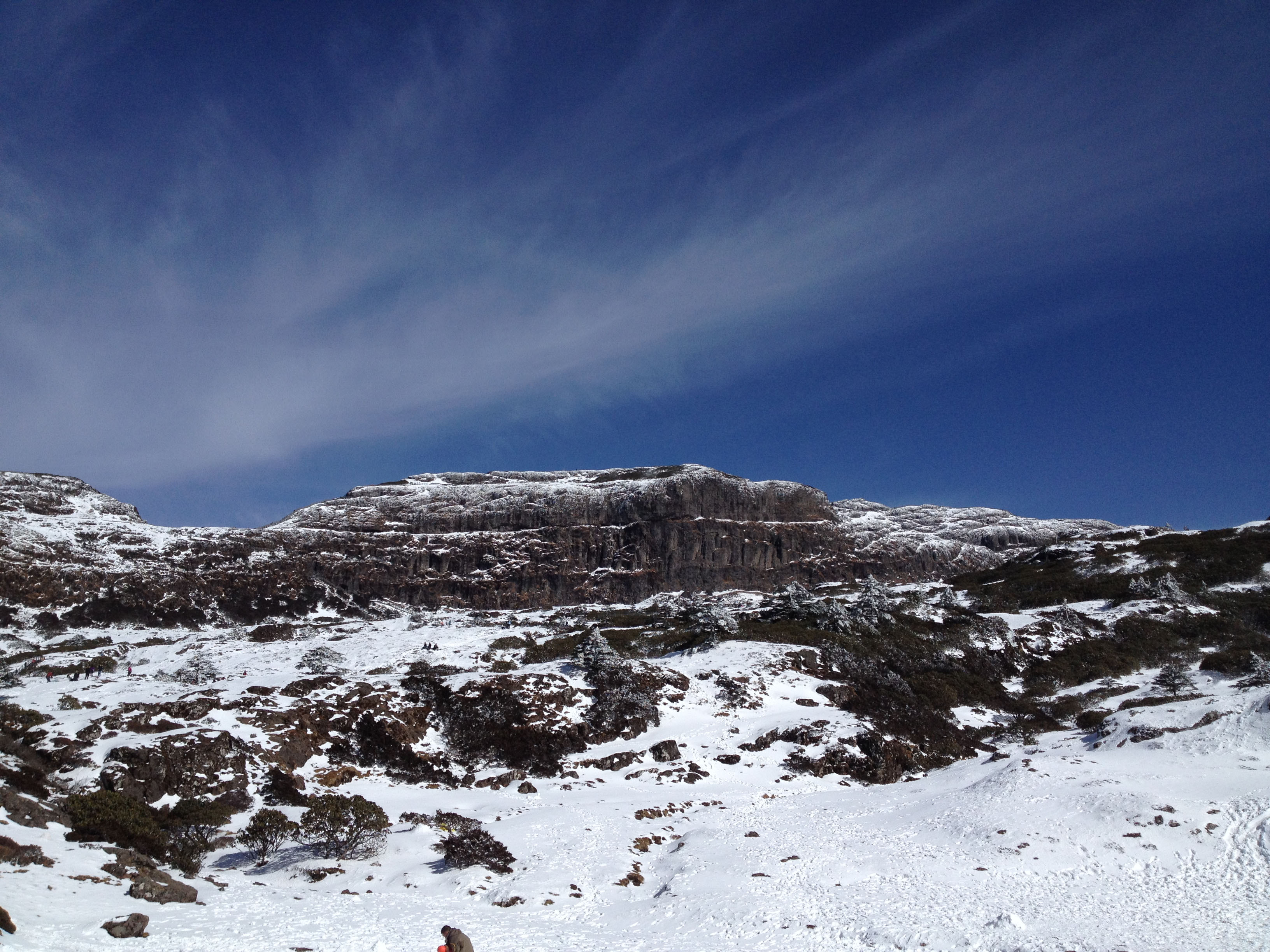 昆明北部的轿子山，为国家级自然保护区。